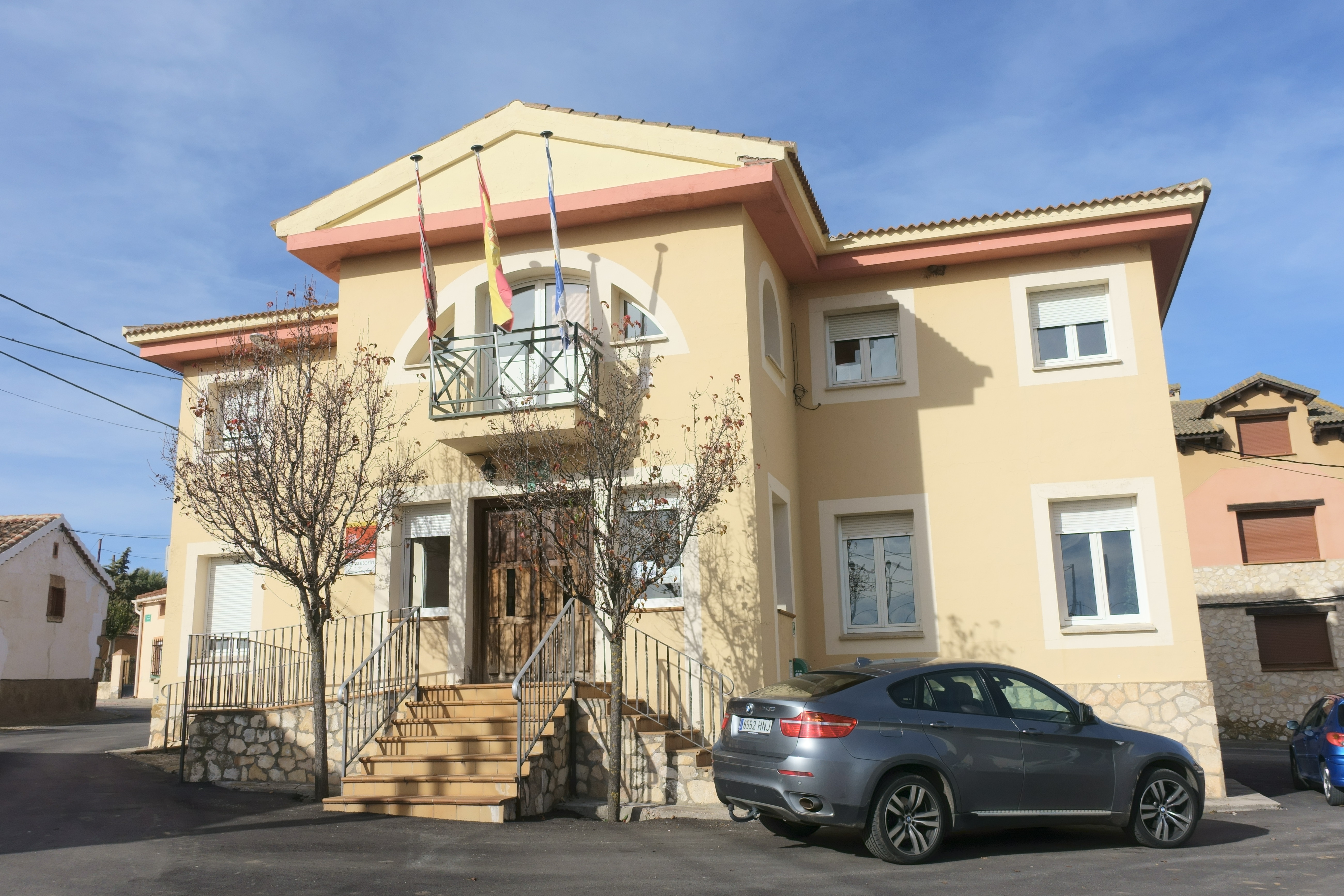 Casa consistorial de Grajera (Segovia, España).